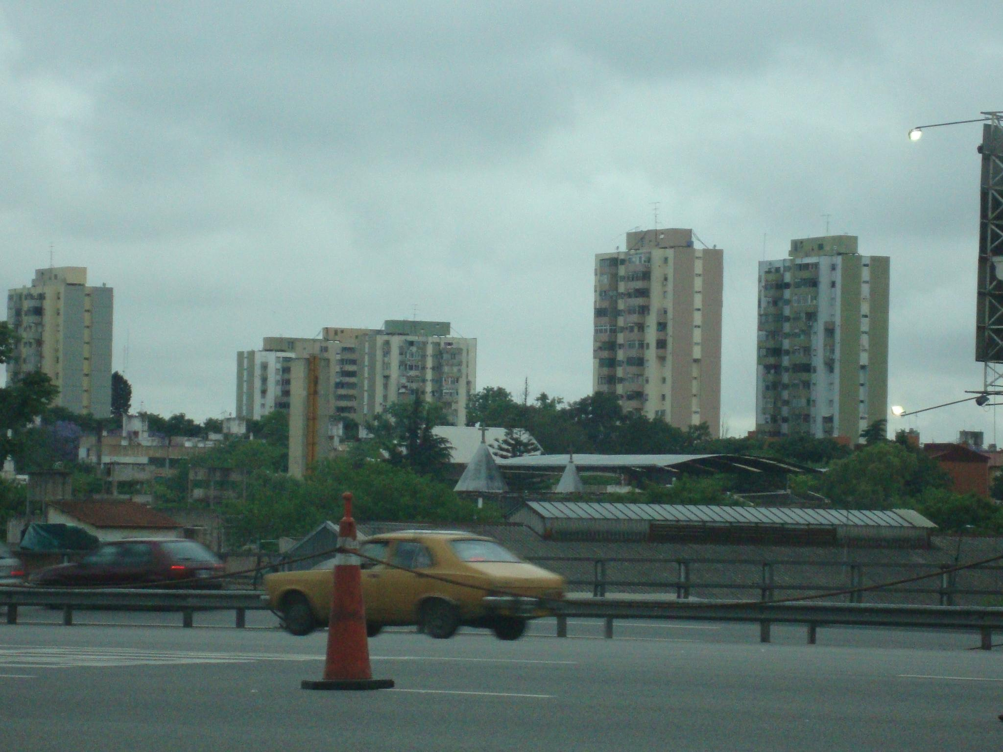 Vista del Barrio Dr. Mariano Castex (Conjunto San Pedrito) desde el peaje de la Autopista 25 de Mayo (AU1). Barrio de Flores, Buenos Aires, Argentina.